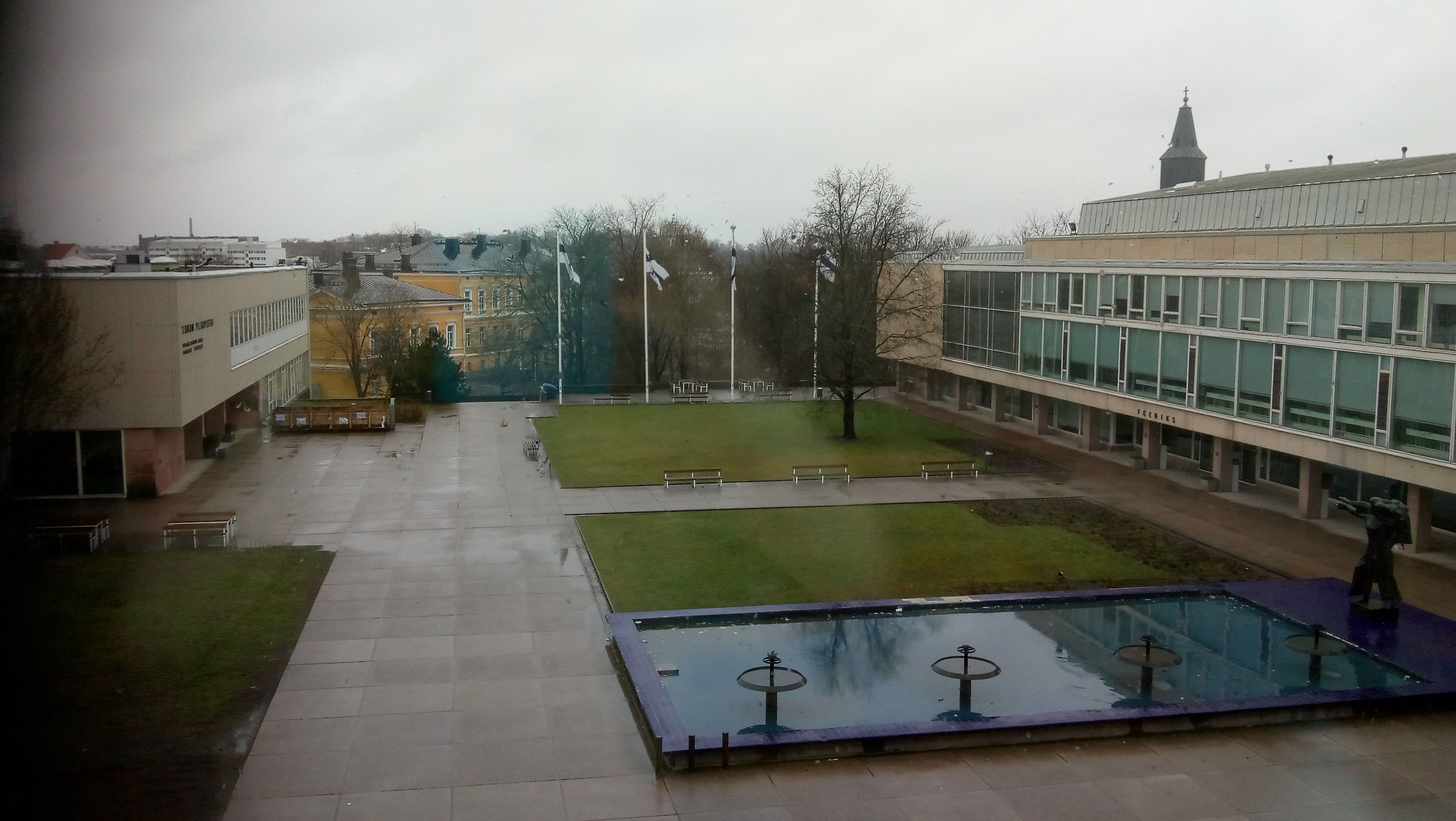 Yliopistonmäen kampus.